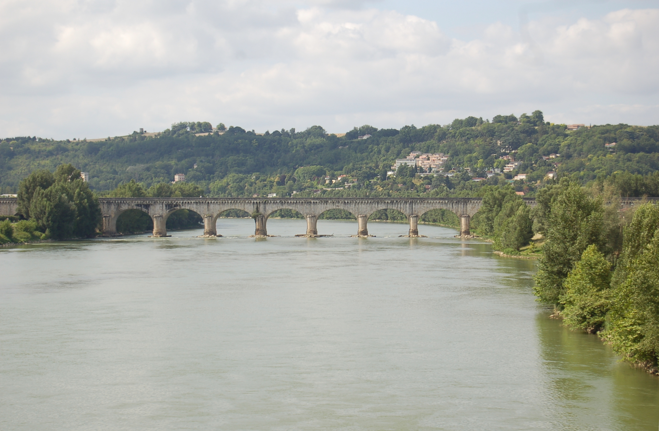 Pont canal d'Agen